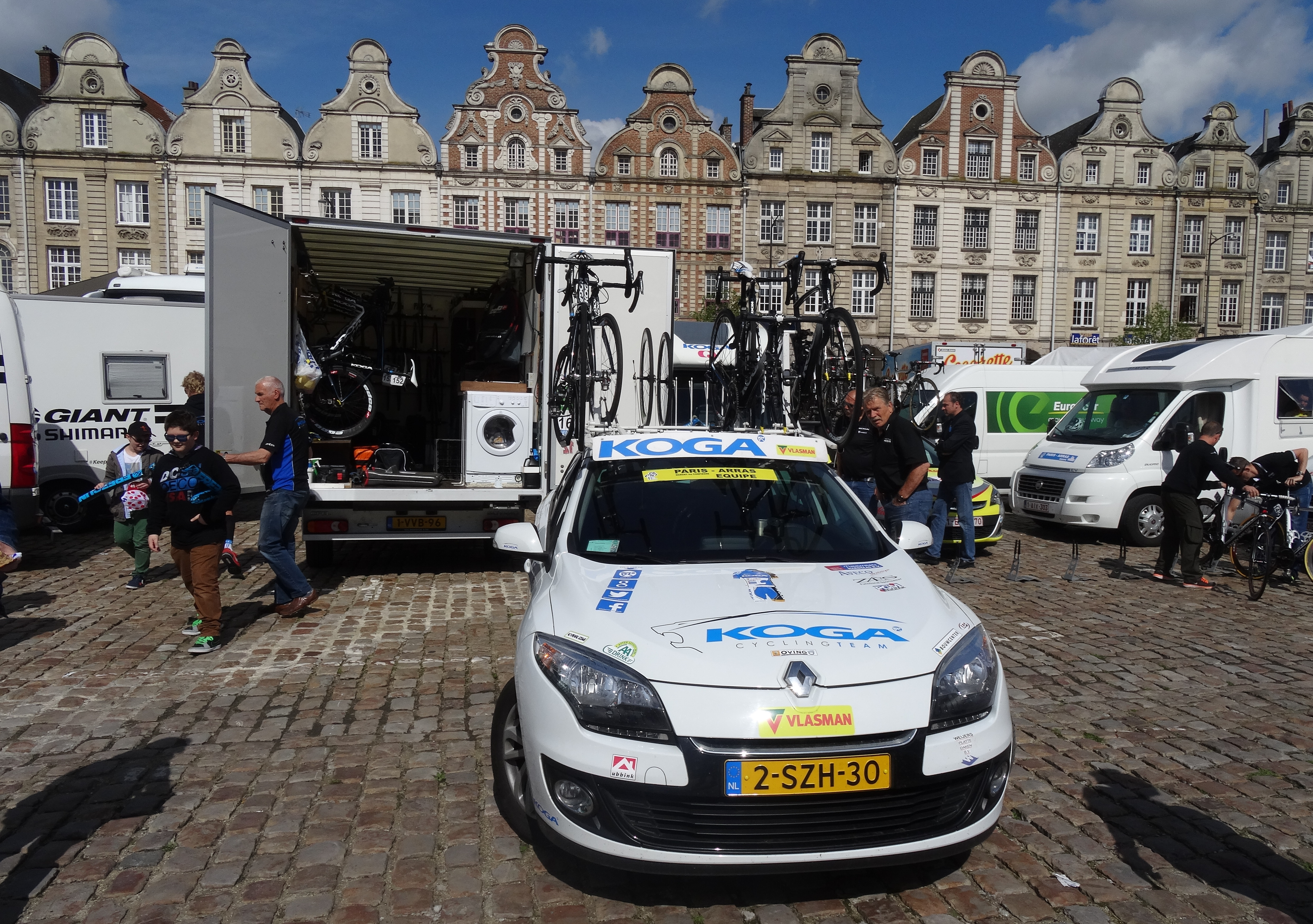 Reportage photographique réalisé le dimanche 25 mai 2014 à l'occasion du départ et de l'arrivée de la troisième étape du Paris-Arras Tour 2014 à Arras, Pas-de-Calais, Nord-Pas-de-Calais, France.